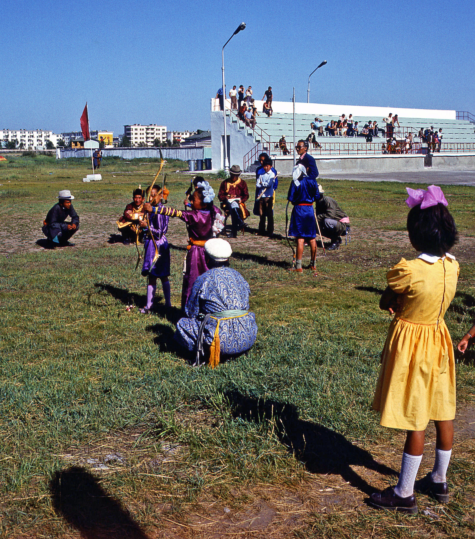 Mongolia, Naadam, archery